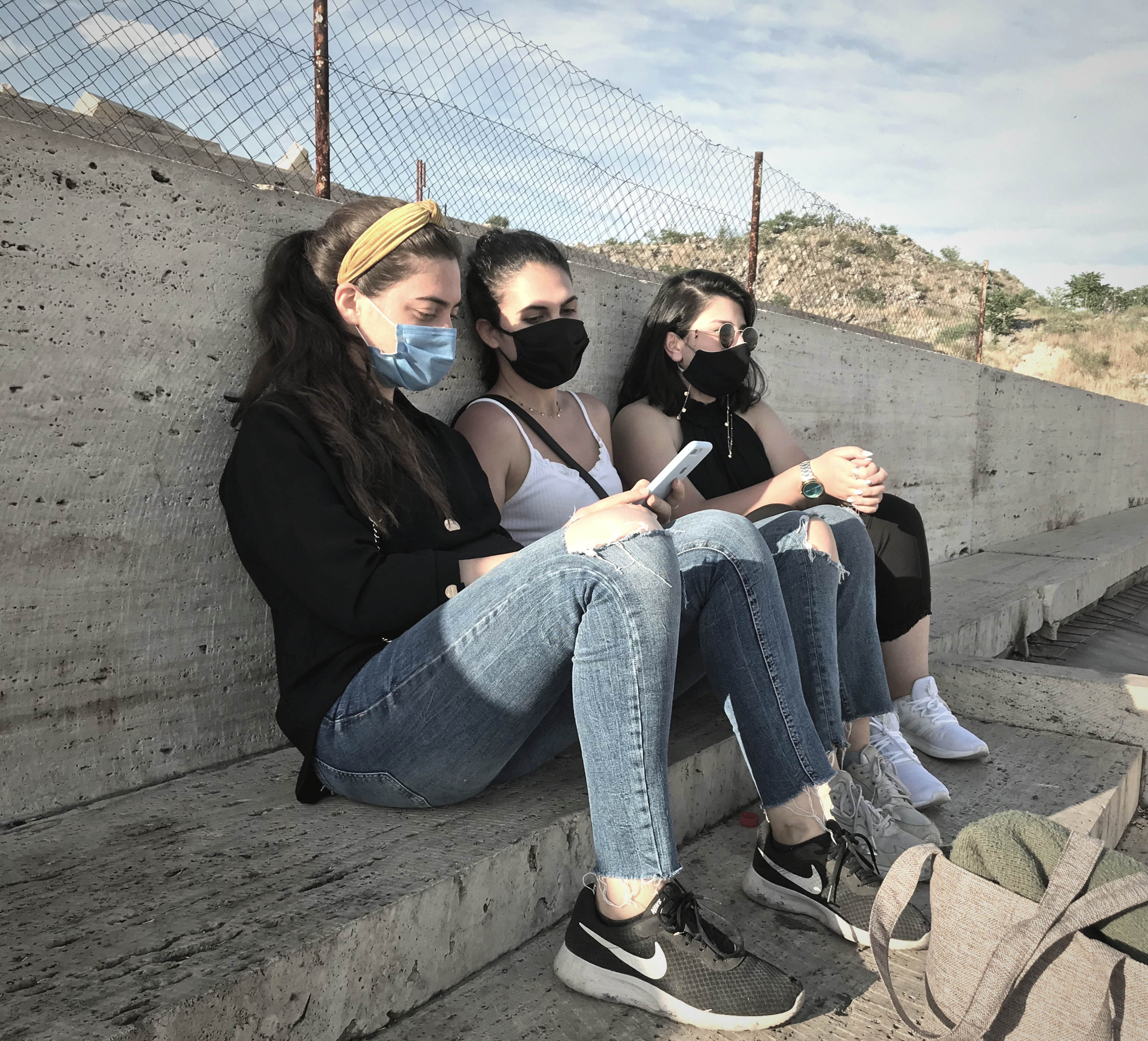 Граждане в масках в центре Еревана из-за чрезвычайного положения в Республике Армения